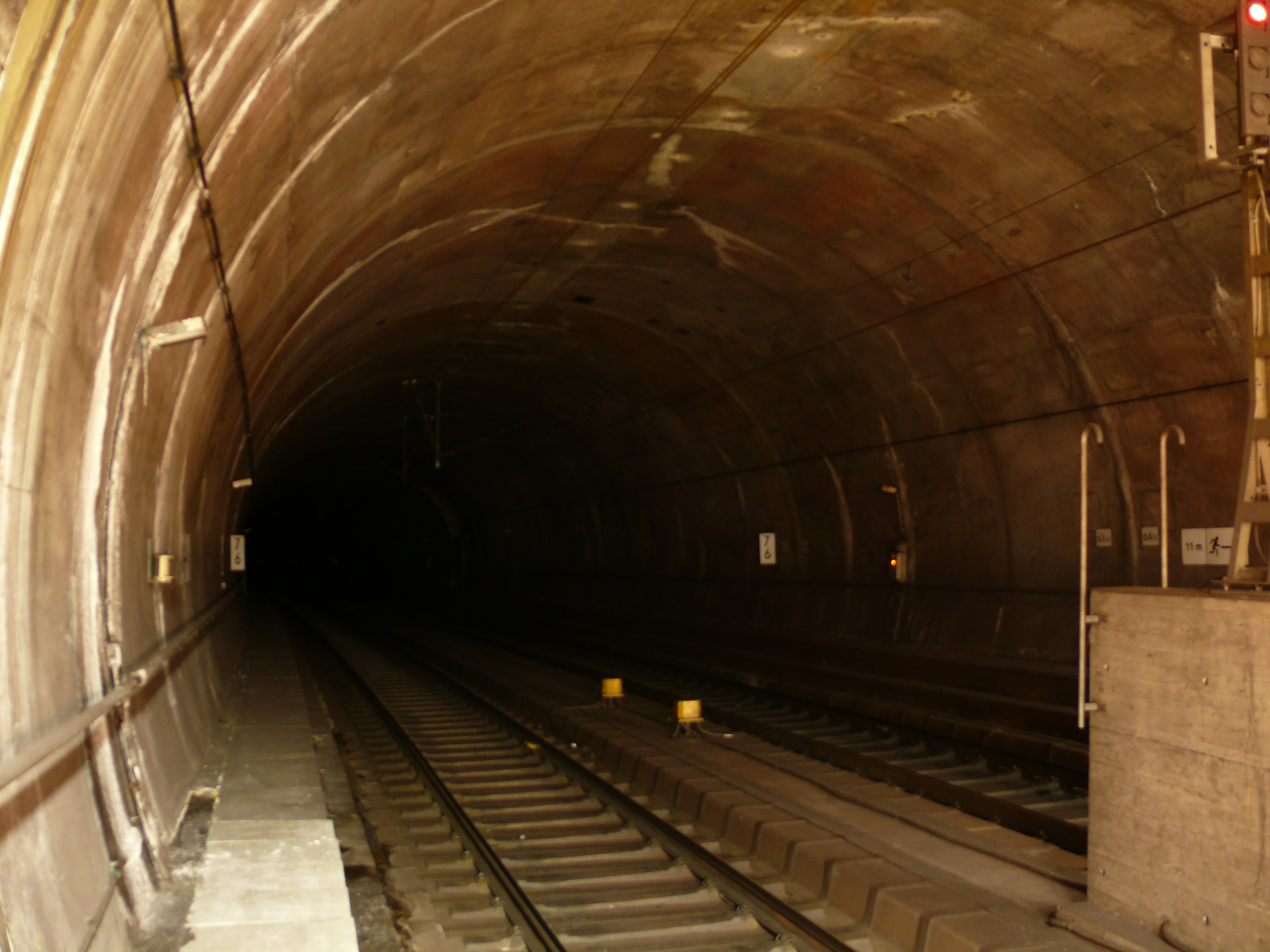 Blick in den Tunnel Richtung Stadtmitte am unterirdischen S-Bahnhof Universität in Stuttgart(-Vaihingen).